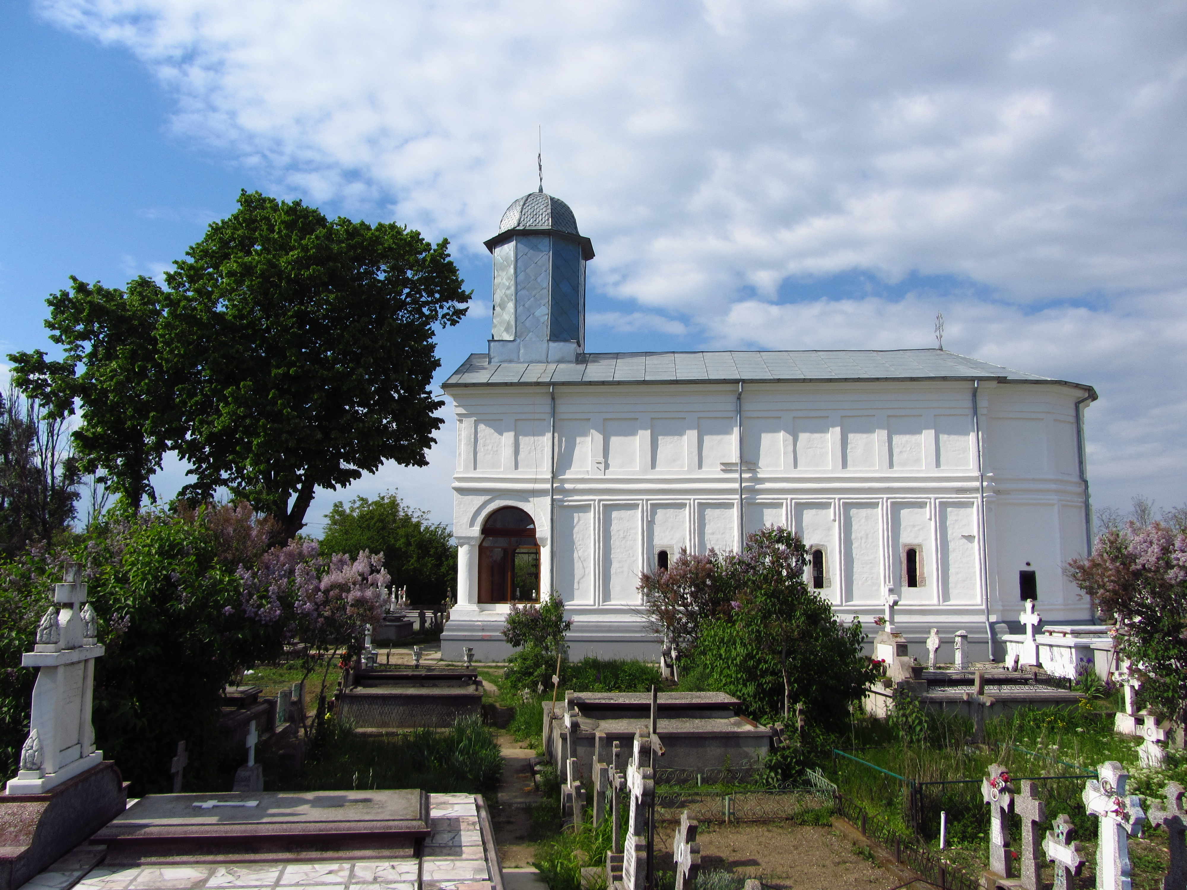 Biserica „Buna Vestire”-Drugănești